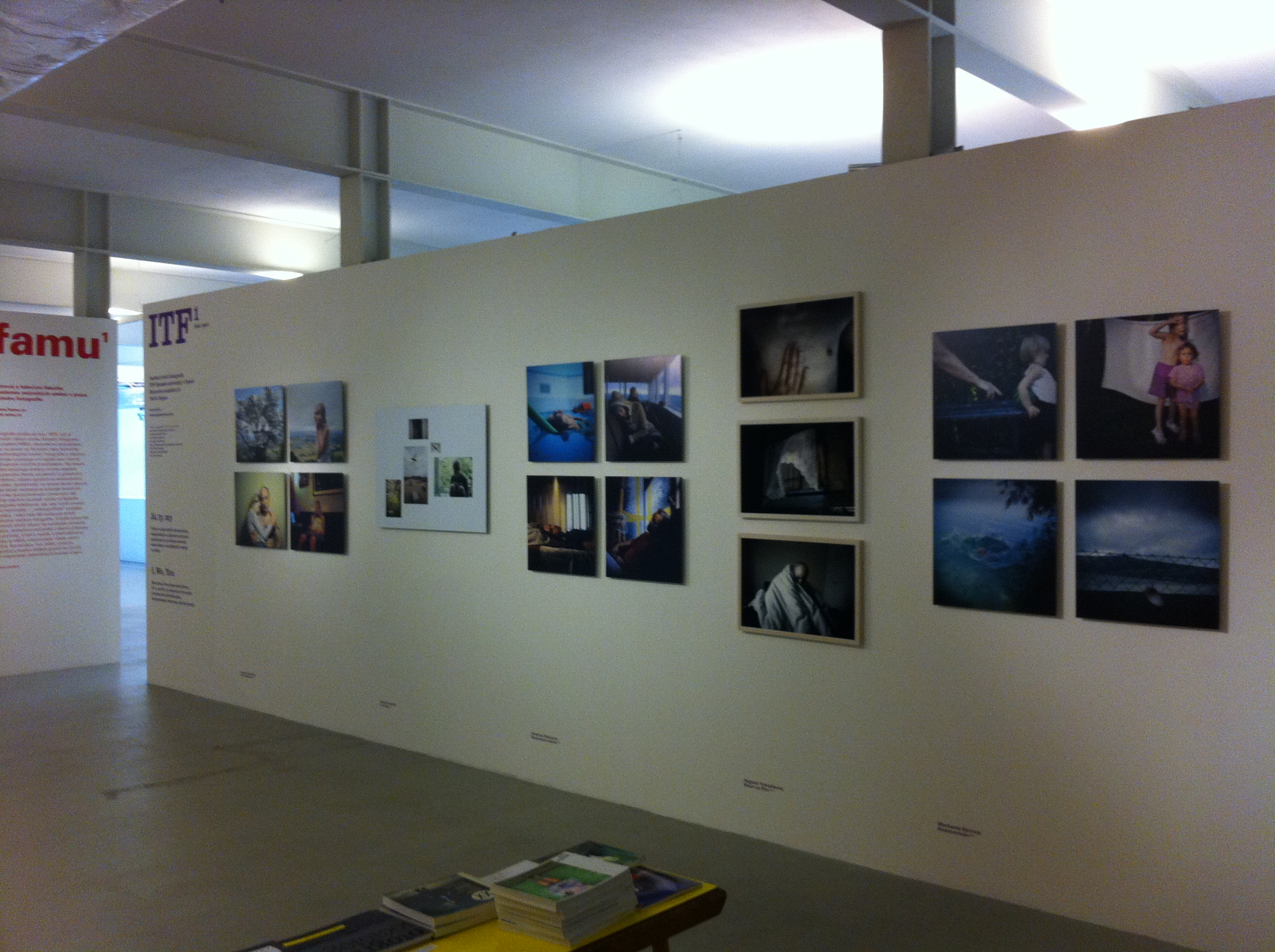 Kristýna Erbenová, fotografické dílo, Výstava Prague Photo 2012, Institut tvůrčí fotografie